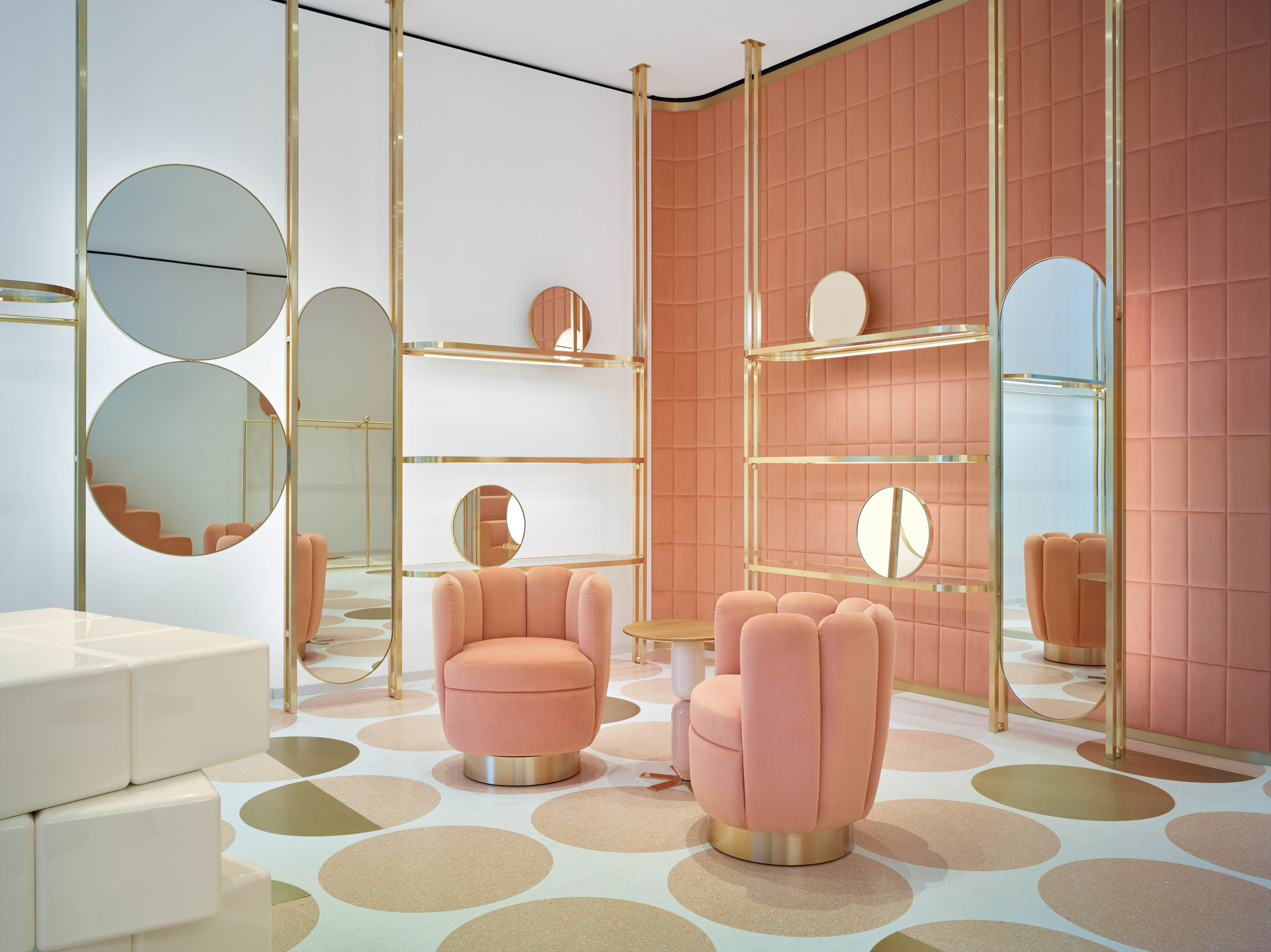 Red Valentino, 133 Sloane Street - London SW1X 9AX Rob Whitrow